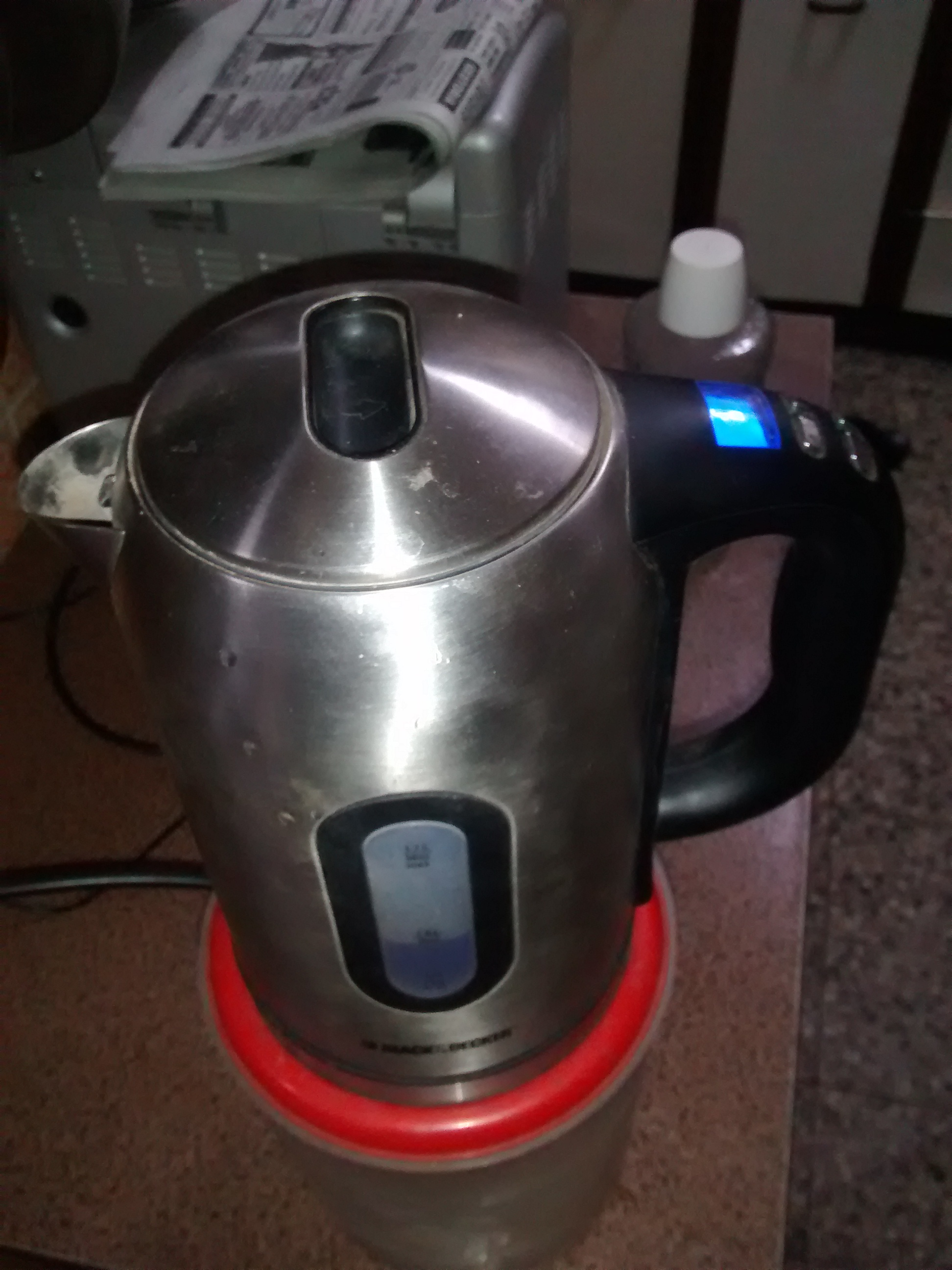 con medidor digital de temperatura